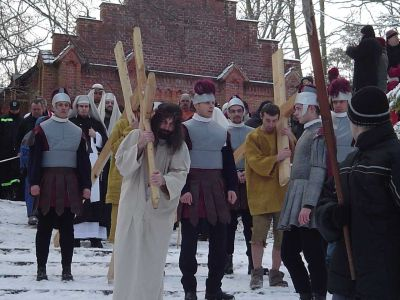 Wejherowskie Misterium Męki Pańskiej